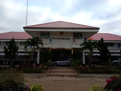 Thai Charoen District